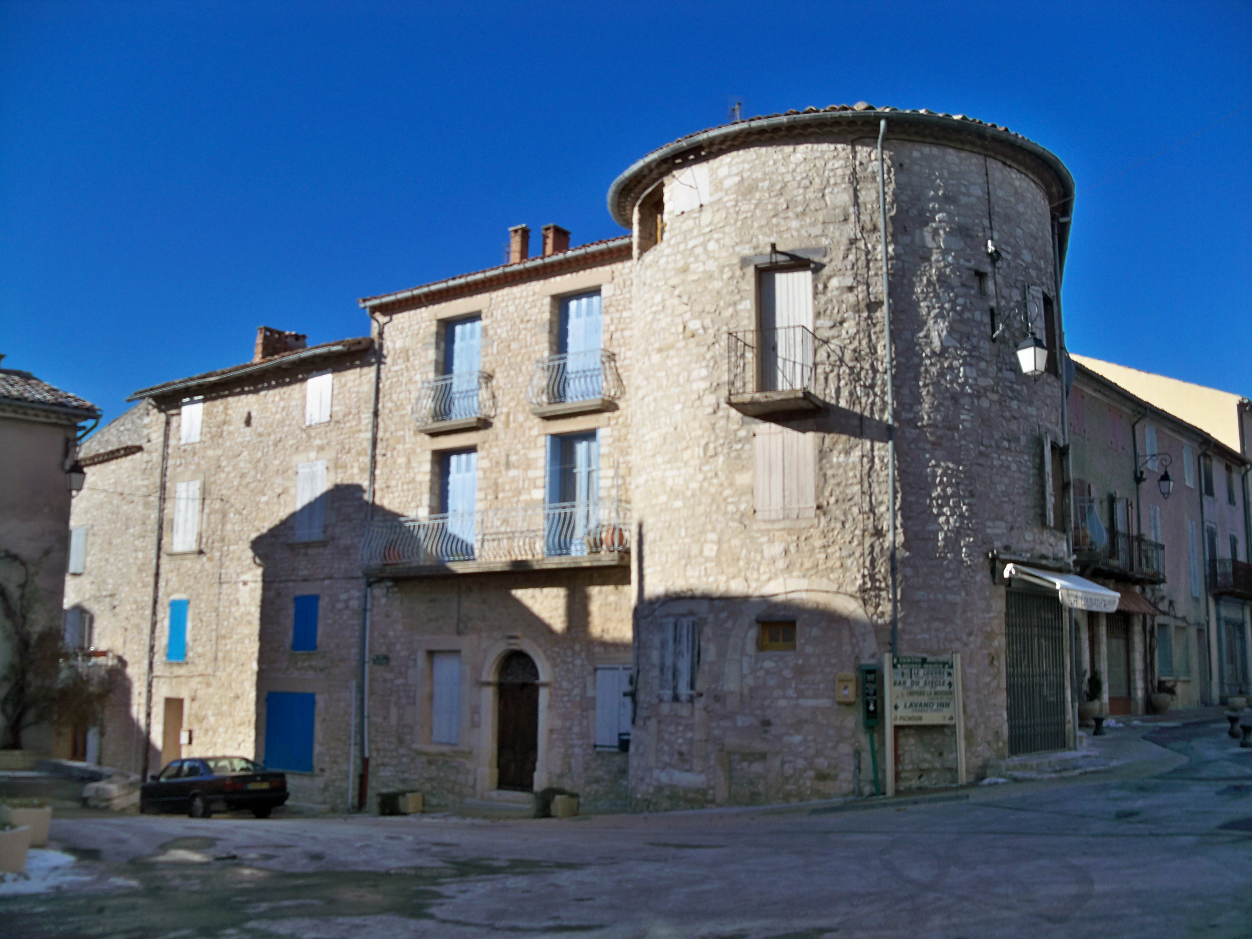 Tour à Sault (Vaucluse)